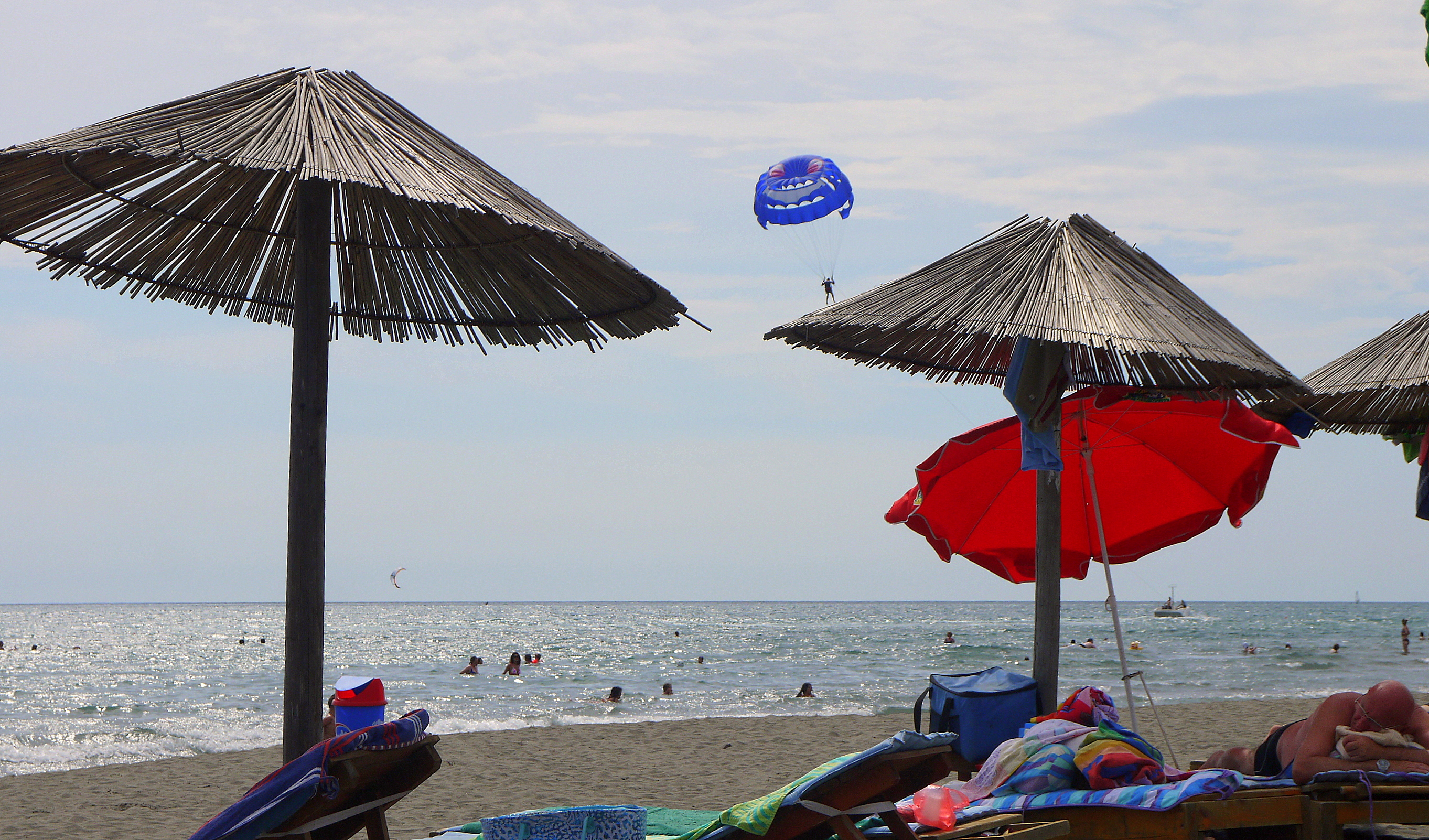 Ulcinj - Imperial Beach